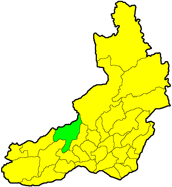 Читинский район на карте Забайкальского края